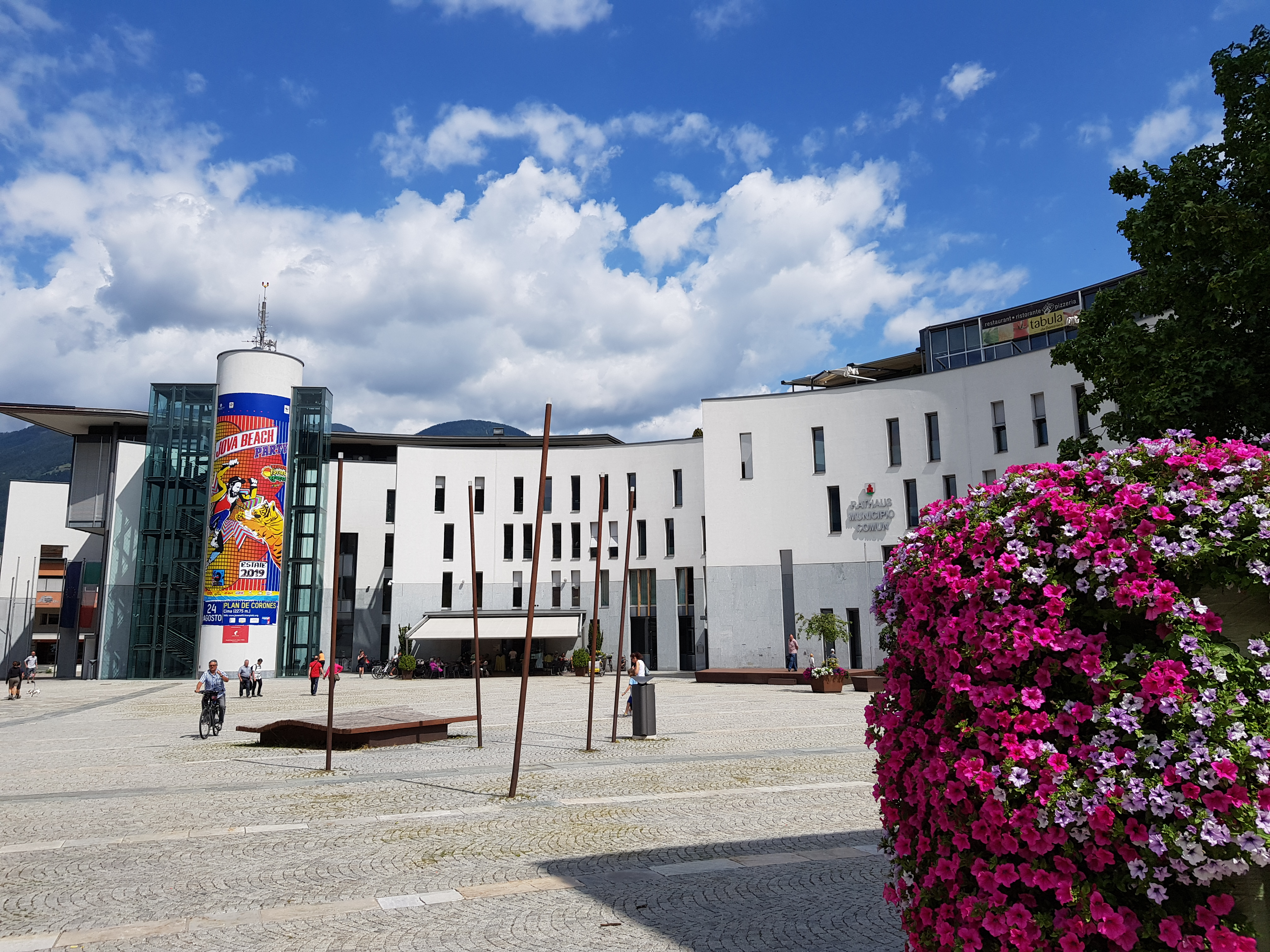 Rathausplatz mit Rathaus, Bruneck, Südtirol